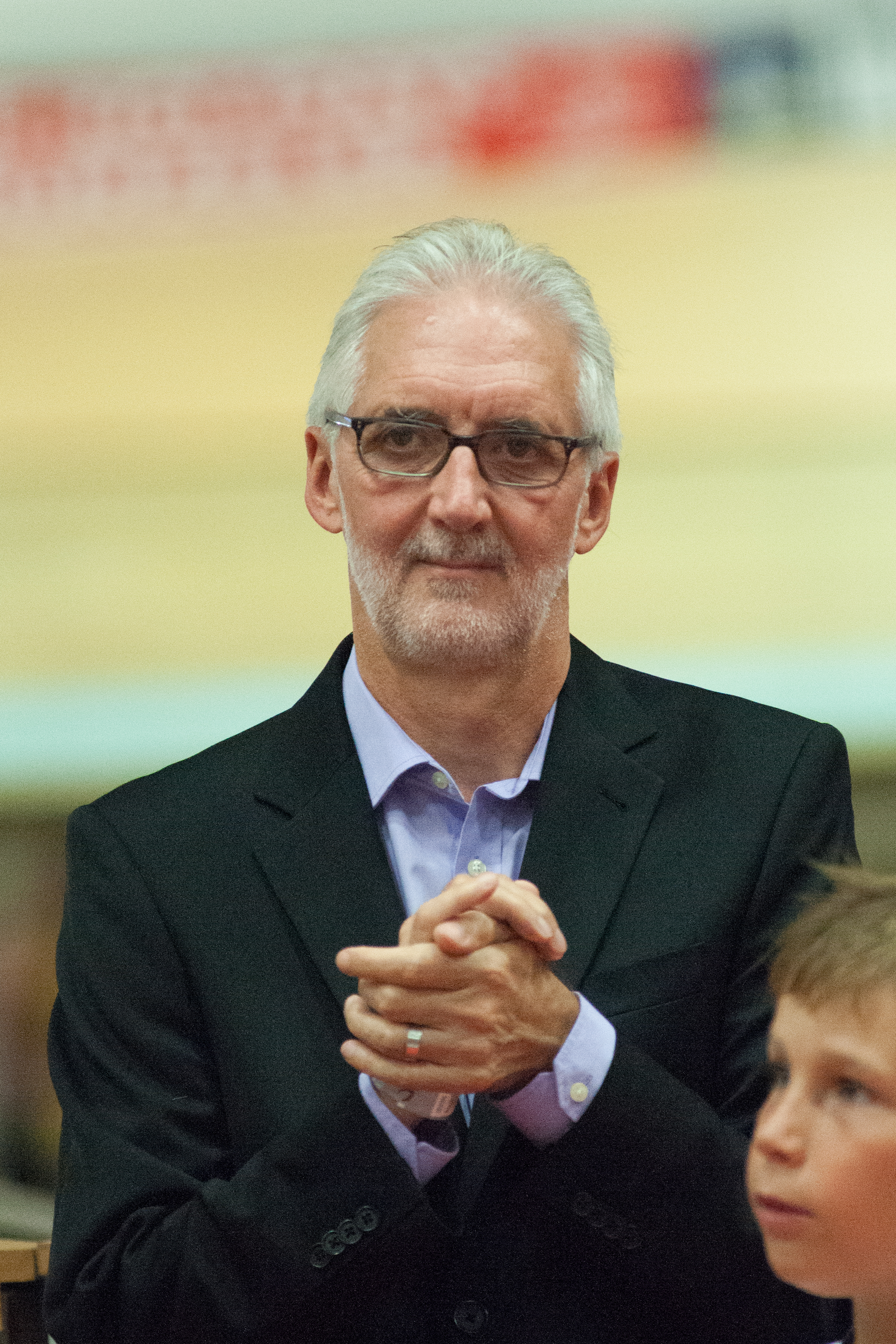 Jens Voigt - Hour Record - Brian Cookson